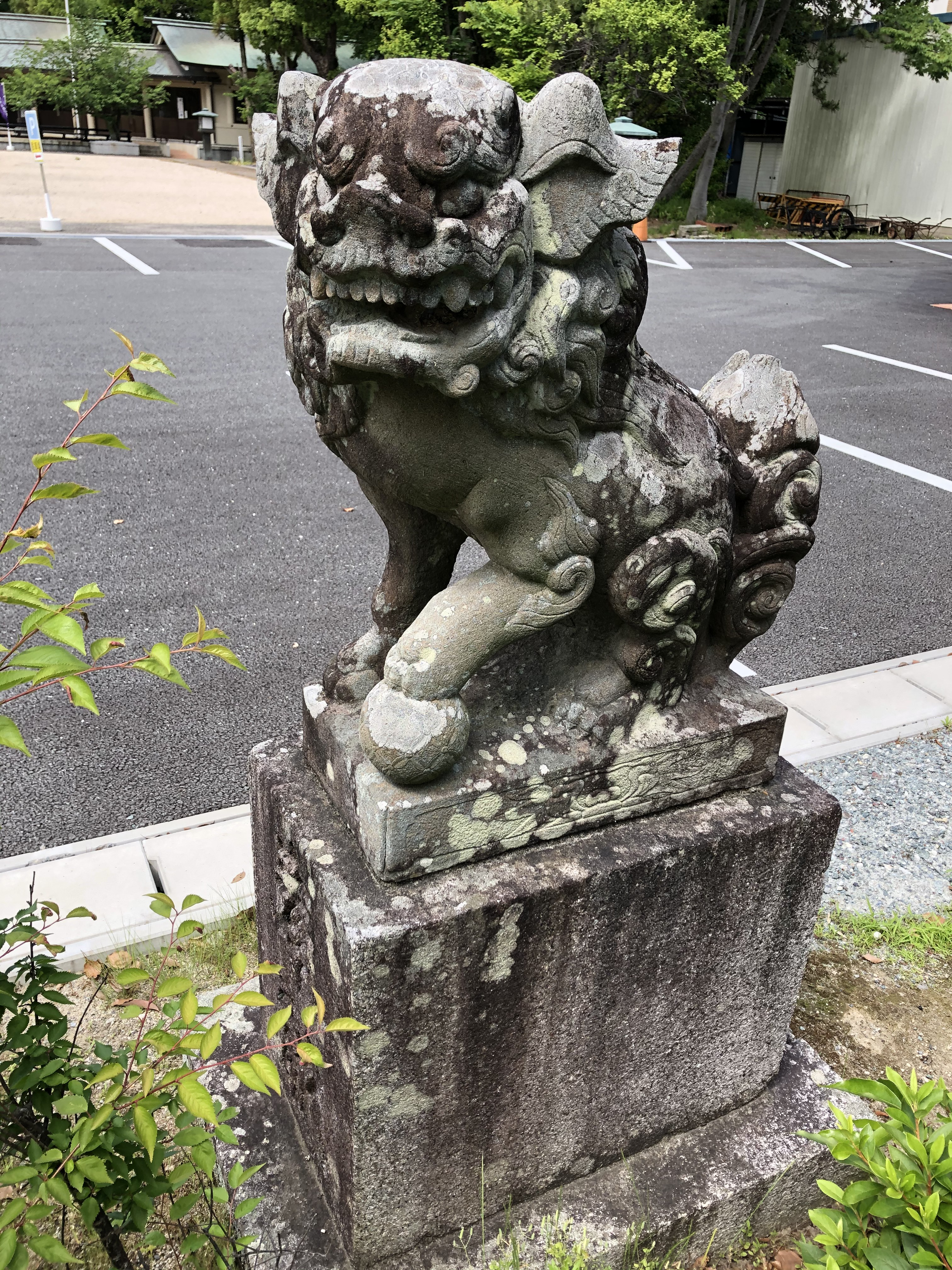 三重県護国神社狛犬